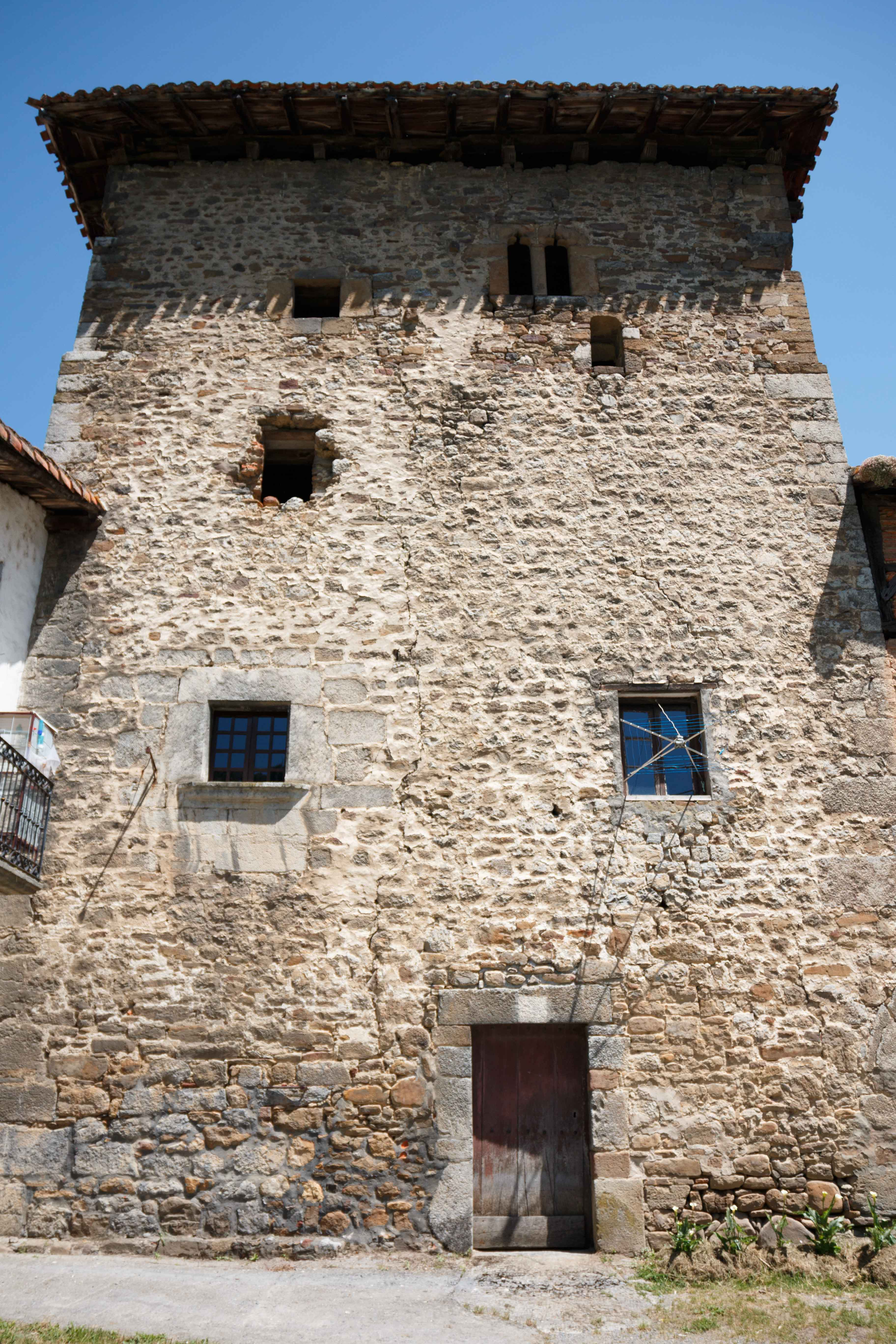 TORRE DE UGARTE